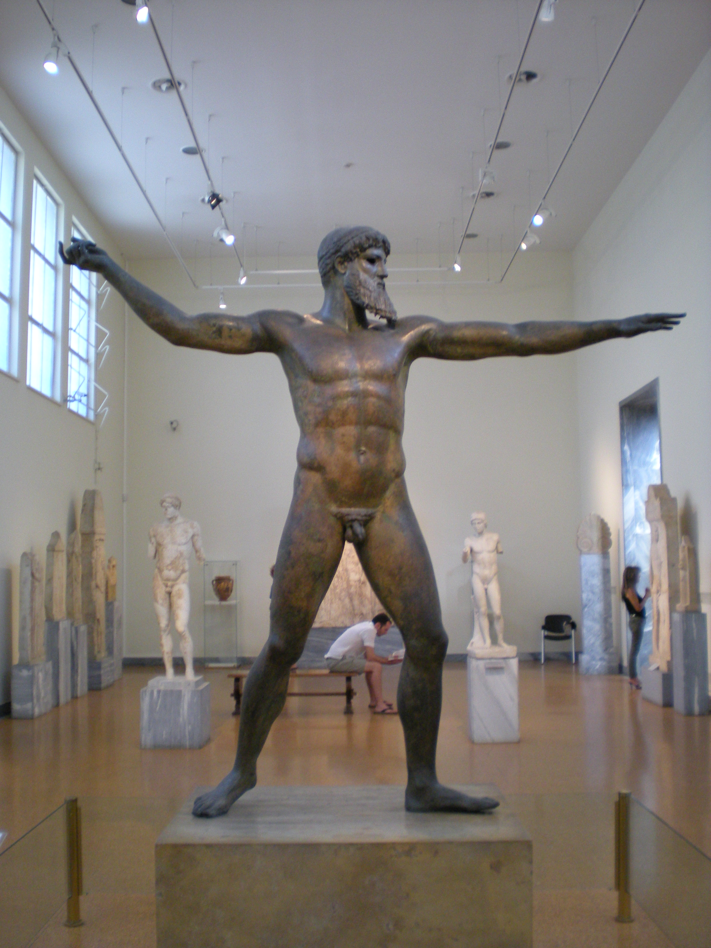 la statua rappresenta o zeus o poseidone. Gli studiosi non sono ancora riusciti a definirlo. È di bronzo e si trova al museo archeologico di Atene.